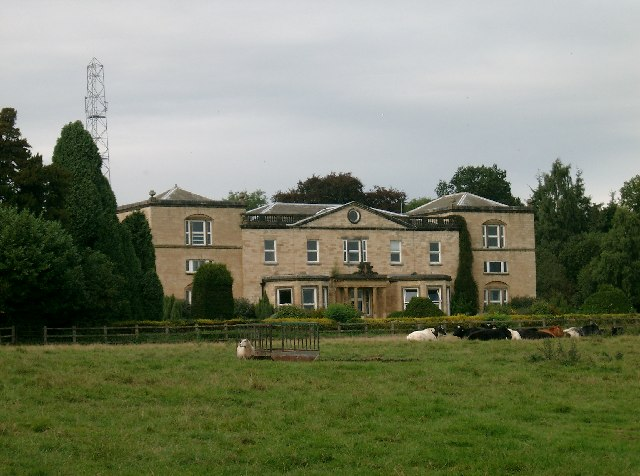 Becca Hall